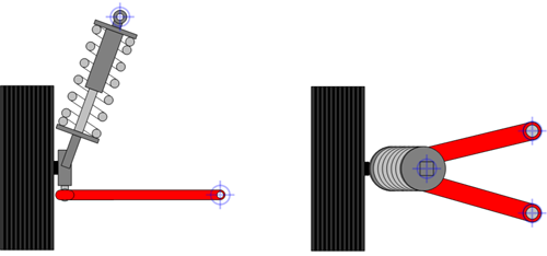 Dessin technique de suspension de type MacPherson, créé pour Wikipedia. Mai 2005 Guillaume Chane Sha Lin